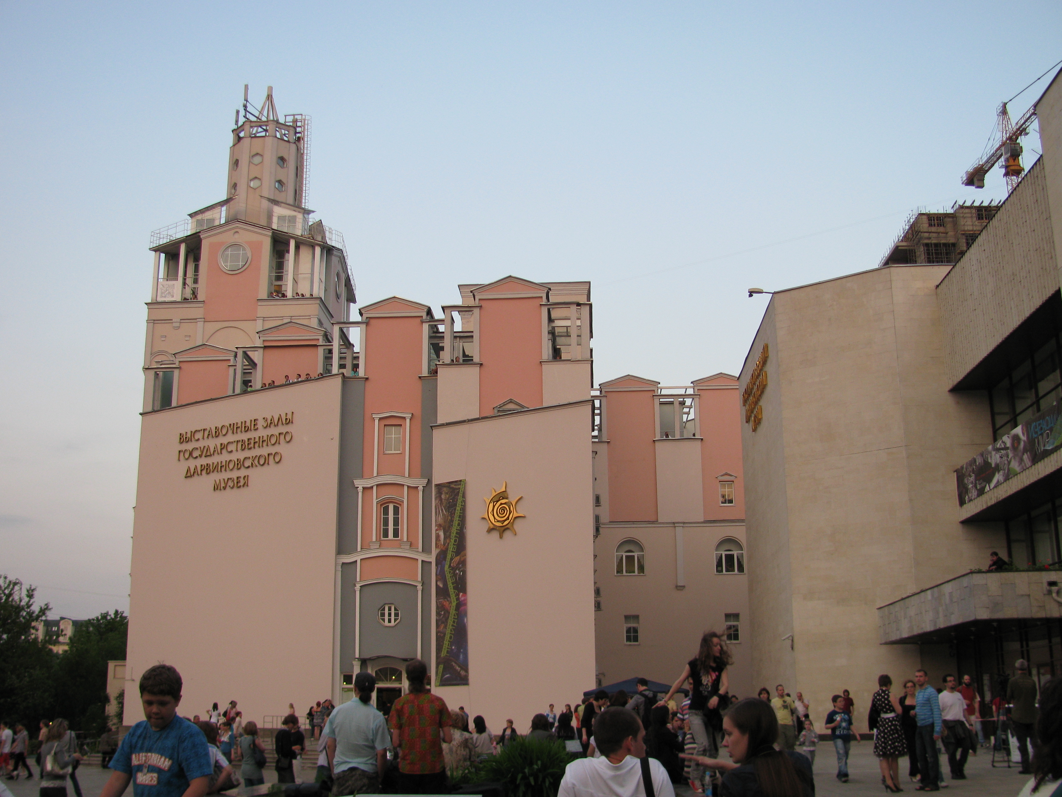 Ночь музеев